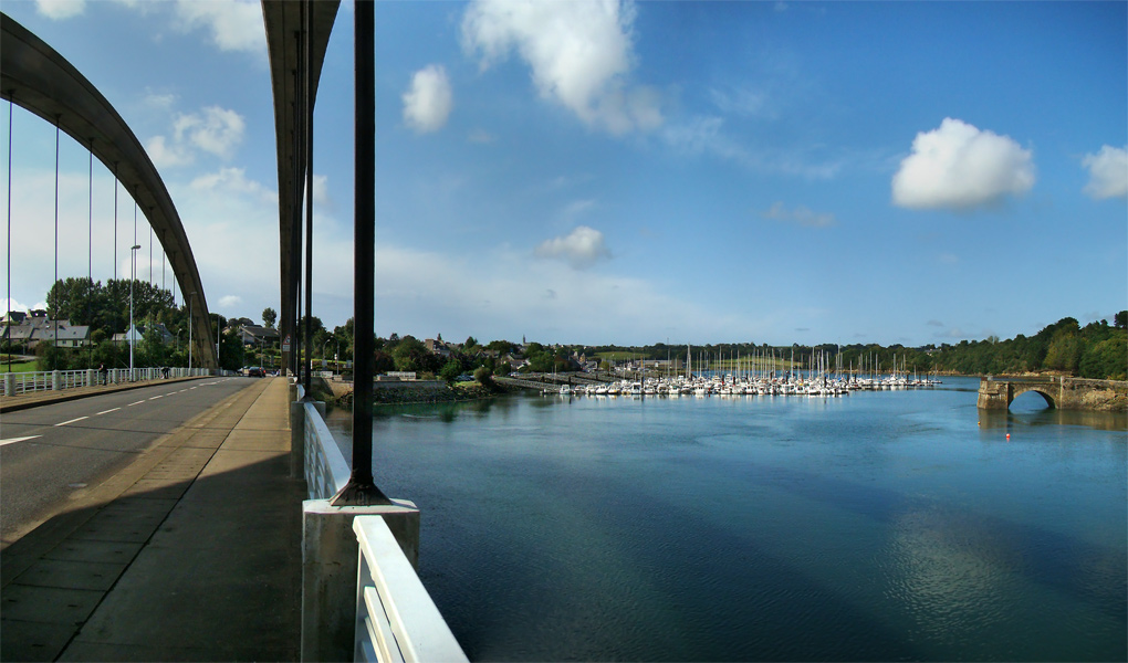 Tréguier, Côtes-d’Armor, Bretagne, France.